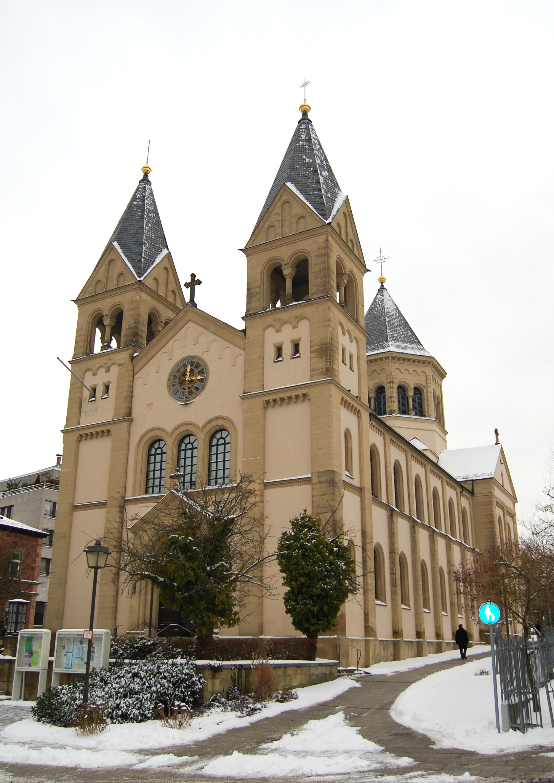 Protestantische Erlöserkirche in Bad Kissingen, Vorderansicht